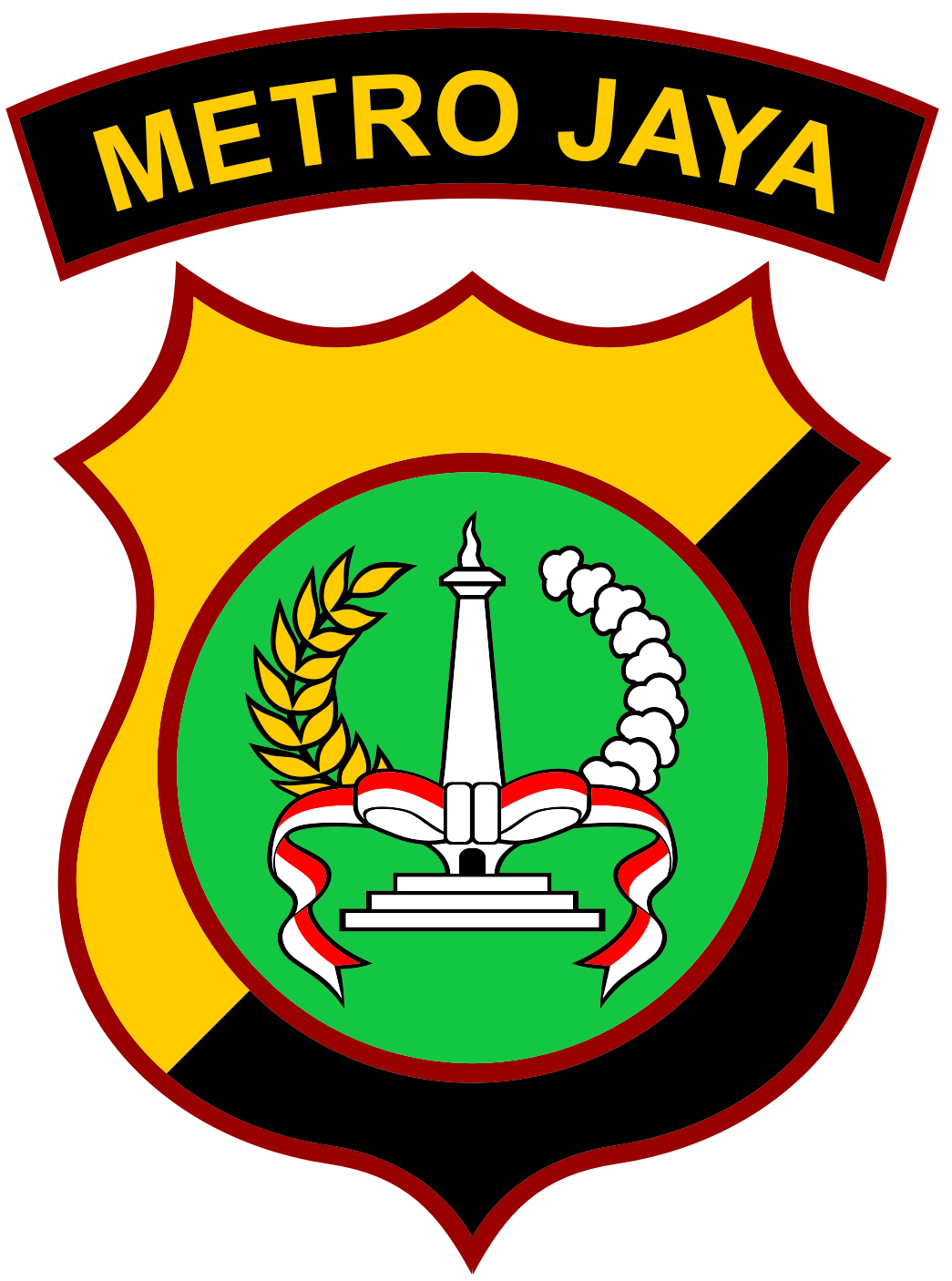 Gambar ini adalah Lambang Kepolisian Daerah Metropolitan Jakarta Raya